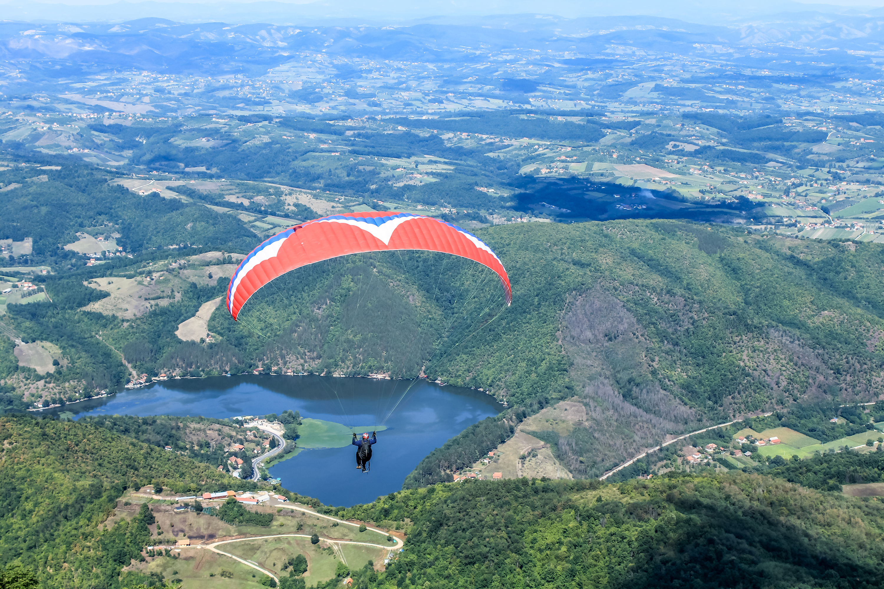 Ово је фотографија заштићеног природног добра у Србији под шифром: ПИО11 This is a a photo of a natural area in Serbia with ID: ПИО11 Предео изузетних одлика Овчарско-кабларска клисура